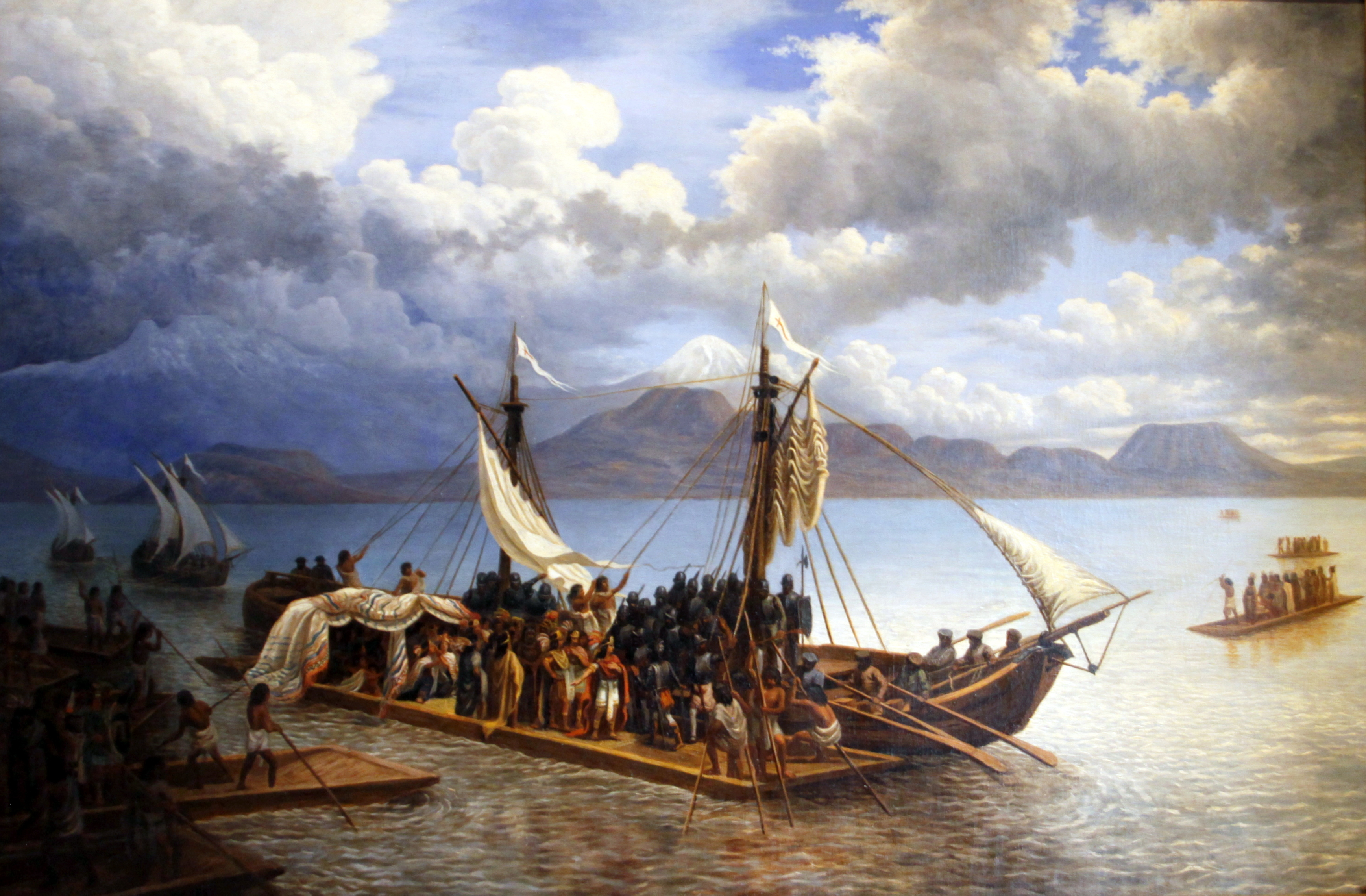 Luis Coto - La Captura de Cuauhtémoc en el Lago de Texcoco